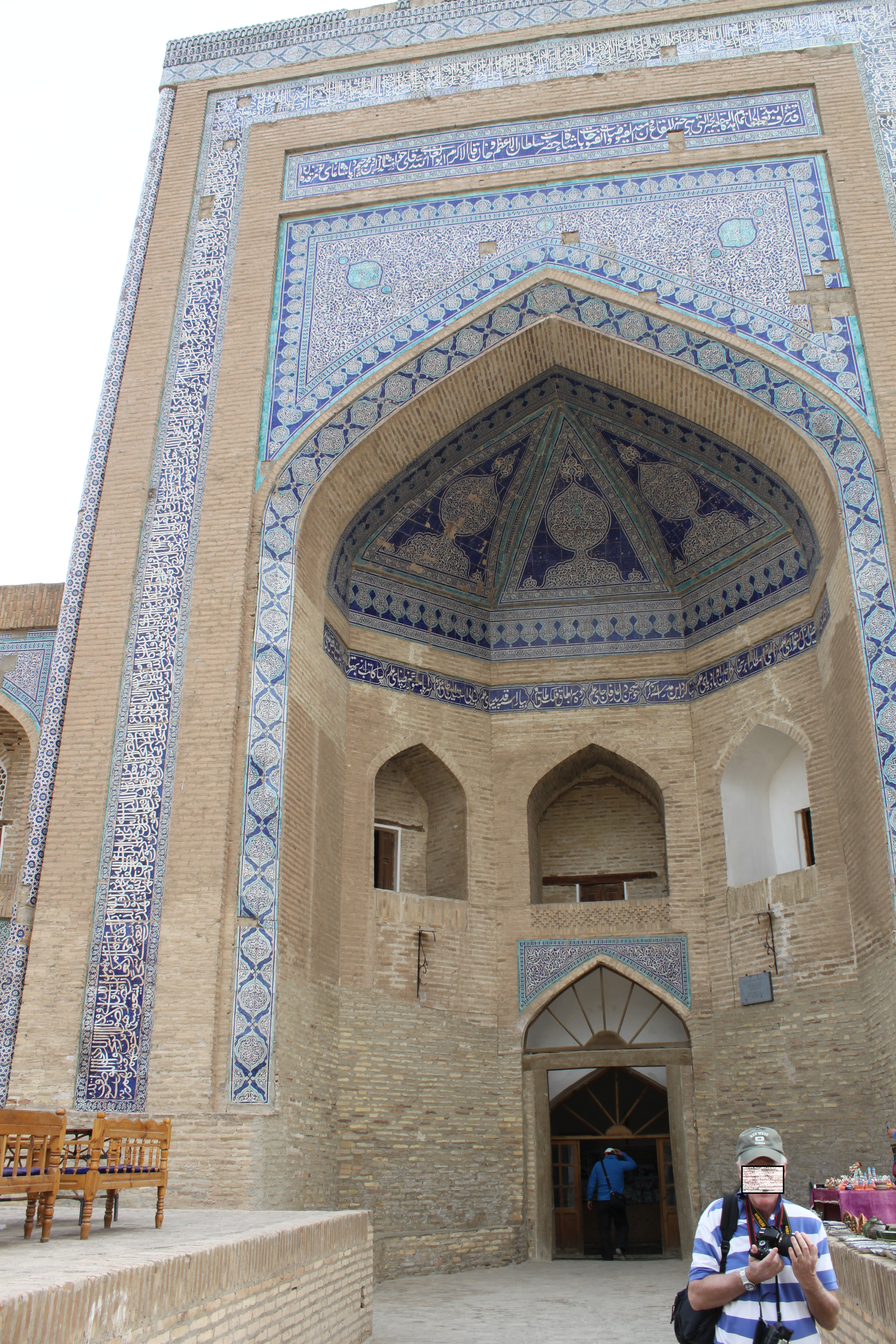 Portail (pishtak) de la madrasa Allakouli Khan